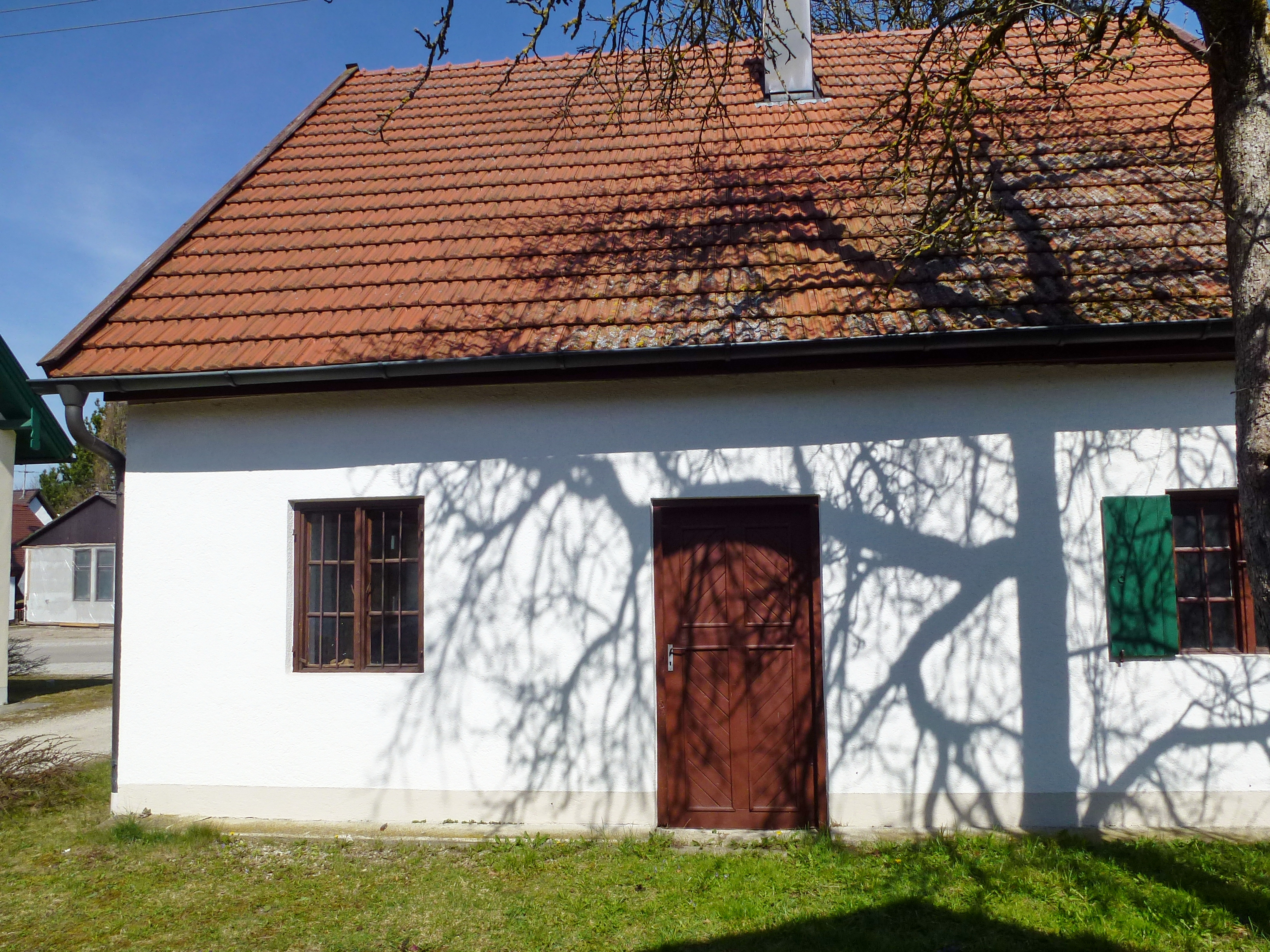 Schöffelding, Hauptstr. 27: Alte Wagnerei, Ansicht von Süden